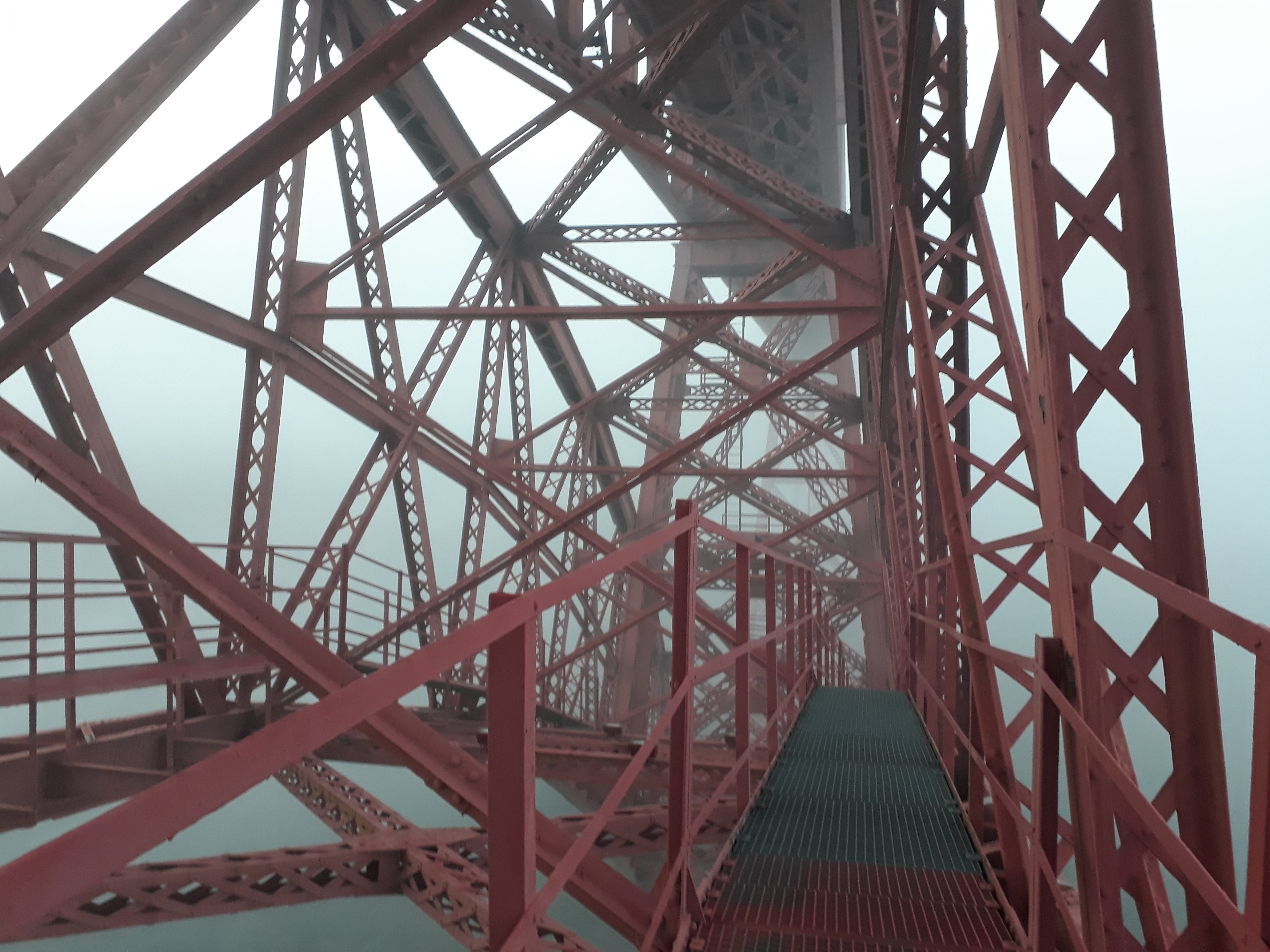 Photo, de la structure interne du viaduc de Garabit prise depuis une passerelle de maintenance